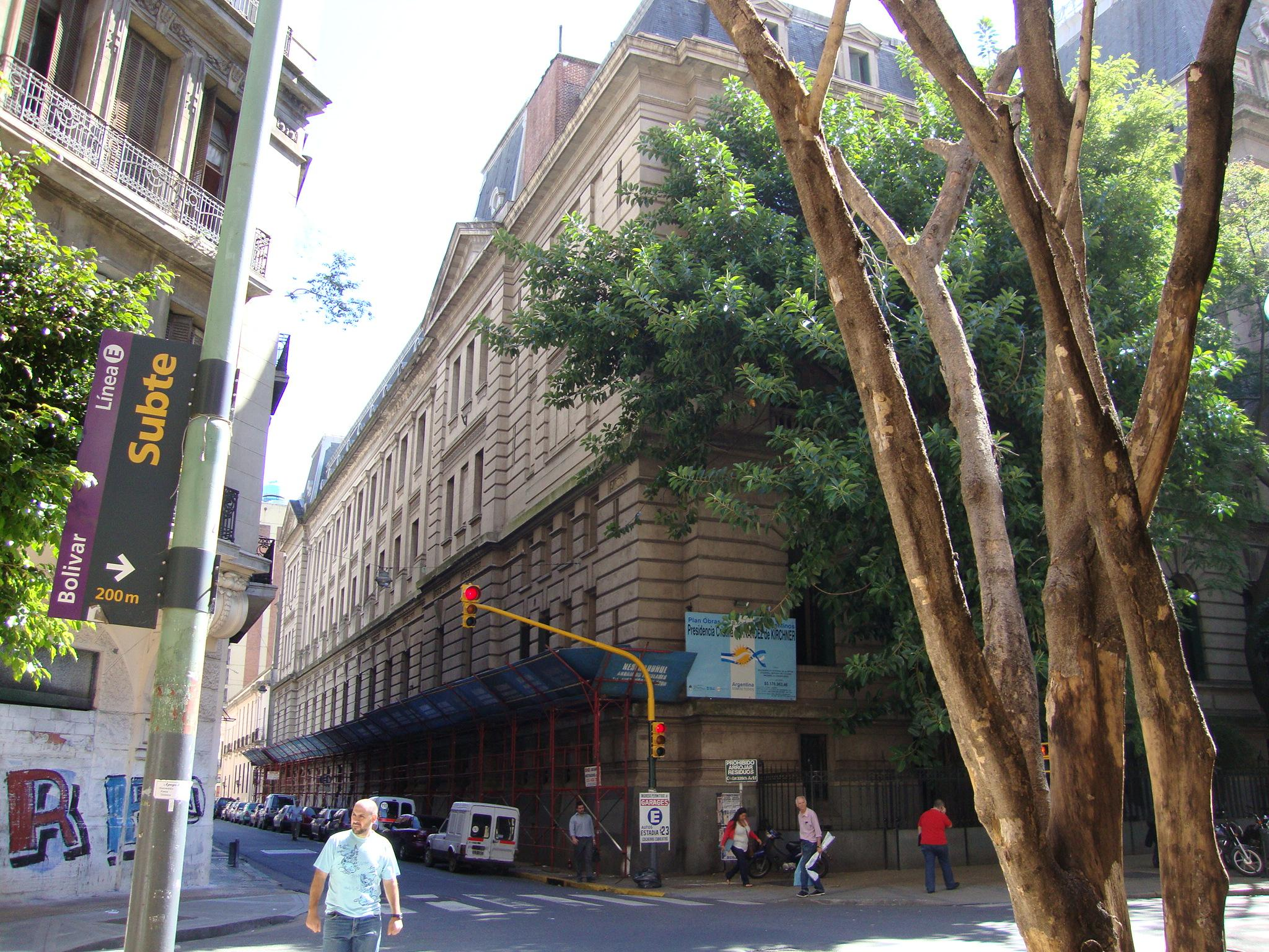 Vista de la fachada lateral del Colegio Nacional de Buenos Aires sobre la calle Moreno. Edificio actual proyectado por el arquitecto francés Norbert-Auguste Maillart, construido entre 1910 y 1938. Depende actualmente de la Universidad de Buenos Aires. Buenos Aires, Argentina.